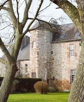 Manoir de Saint-Ortaire (propriété privée), Normandie. Photo prise et publiée par les propriétaires du manoir.